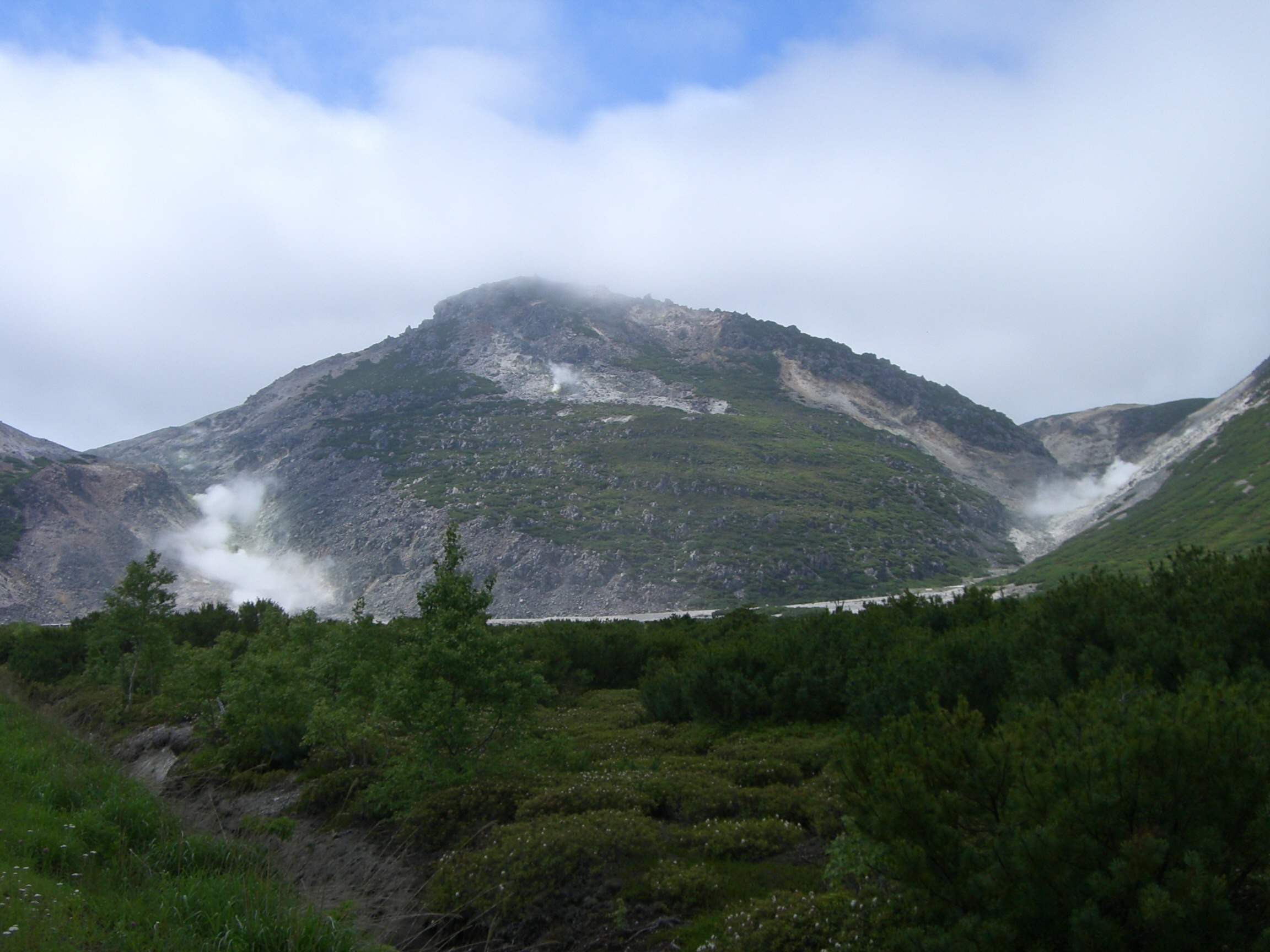 Iou-zan Sulfa-mt. 北海道の硫黄山